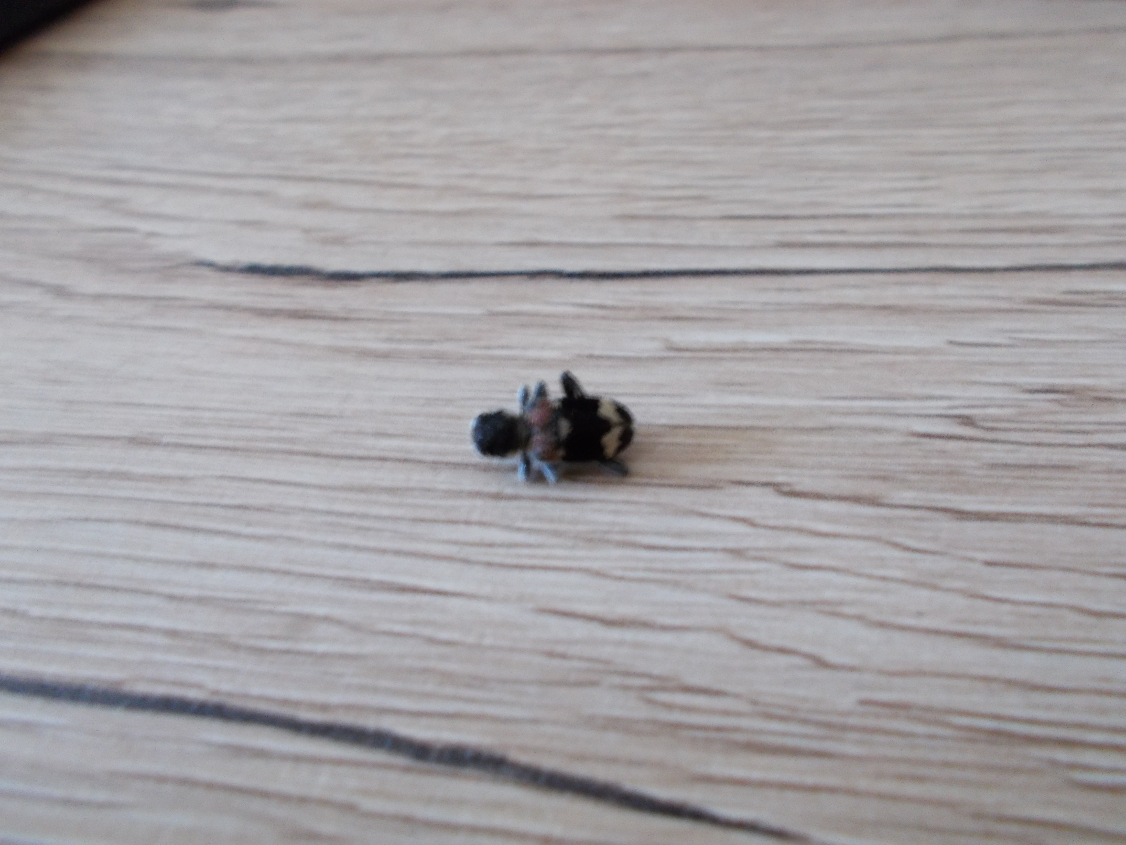 ClerusMutillarius